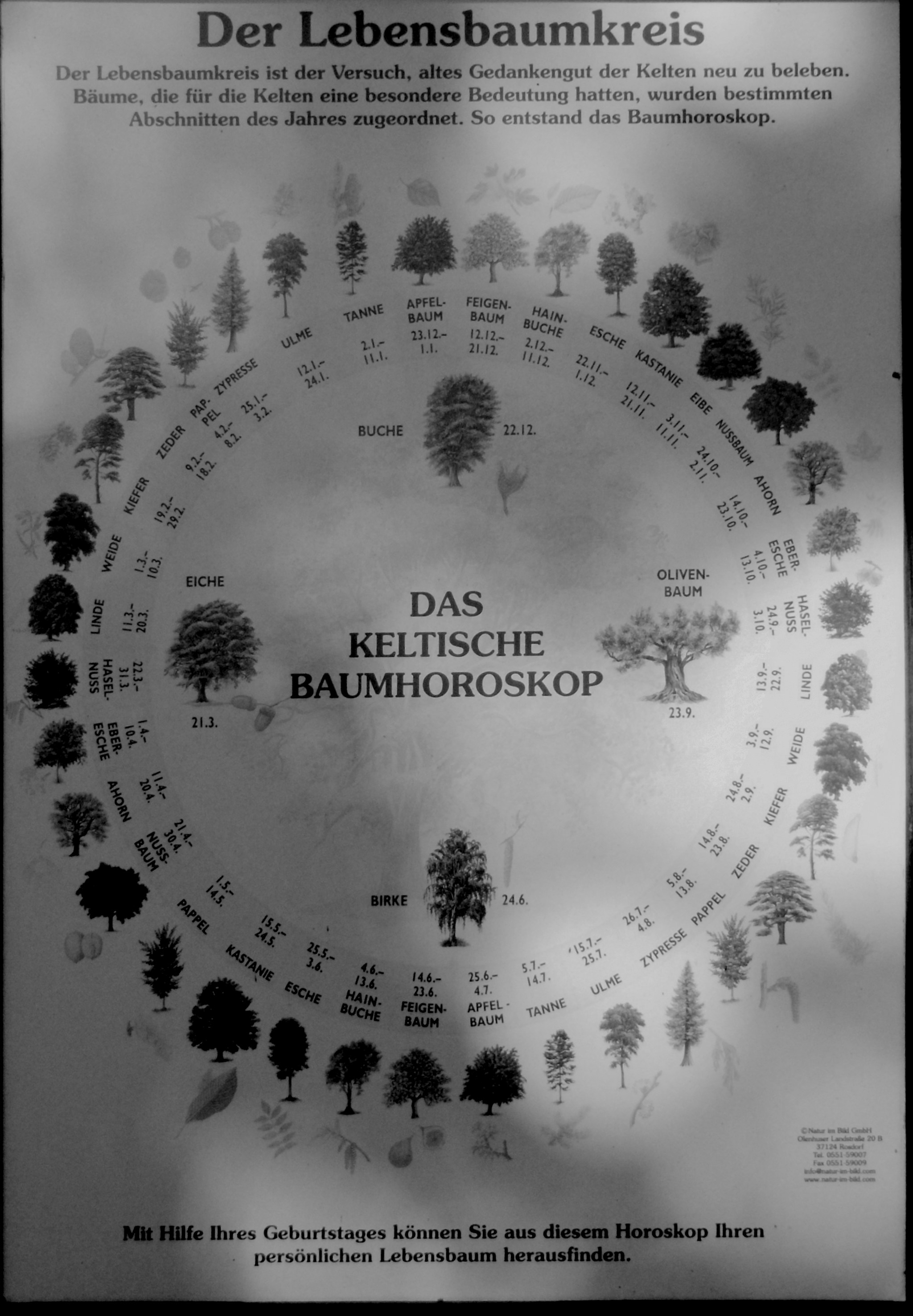 Lebensbaumkreis, auch als Keltisches Baumhoroskop bekannt, Schautafel am Wirchensee, Naturpark Schlaubetal, Brandenburg, Deutschland